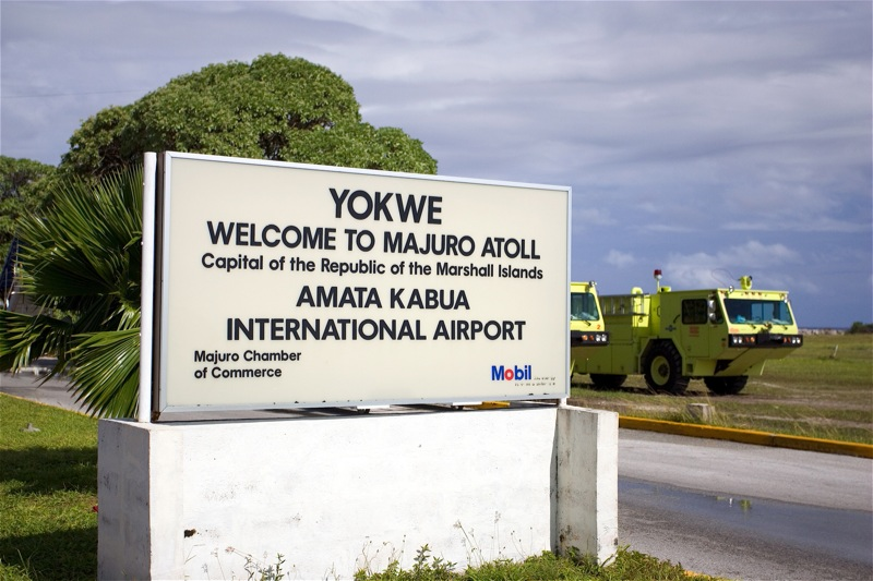 majuro Marshall Islands